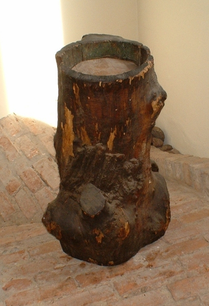 Original des Birnbaums von Ribbeck in der Dorfkirche